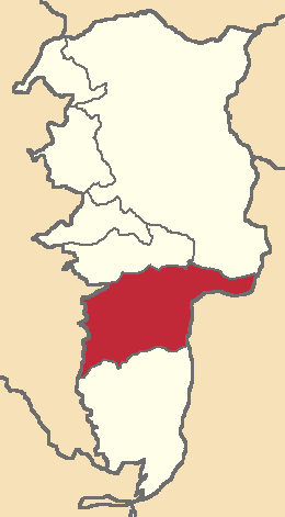 Mapa localizacor del cantón en Bolívar, Ecuador